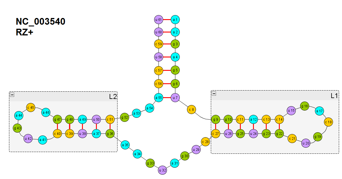 вторичная структура РНК организма NC_003540 фрагмент вироида RZ+